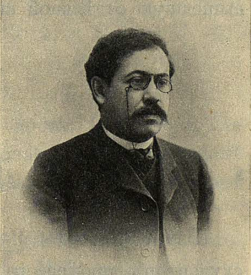 Пресман, Матвей Леонтьевич